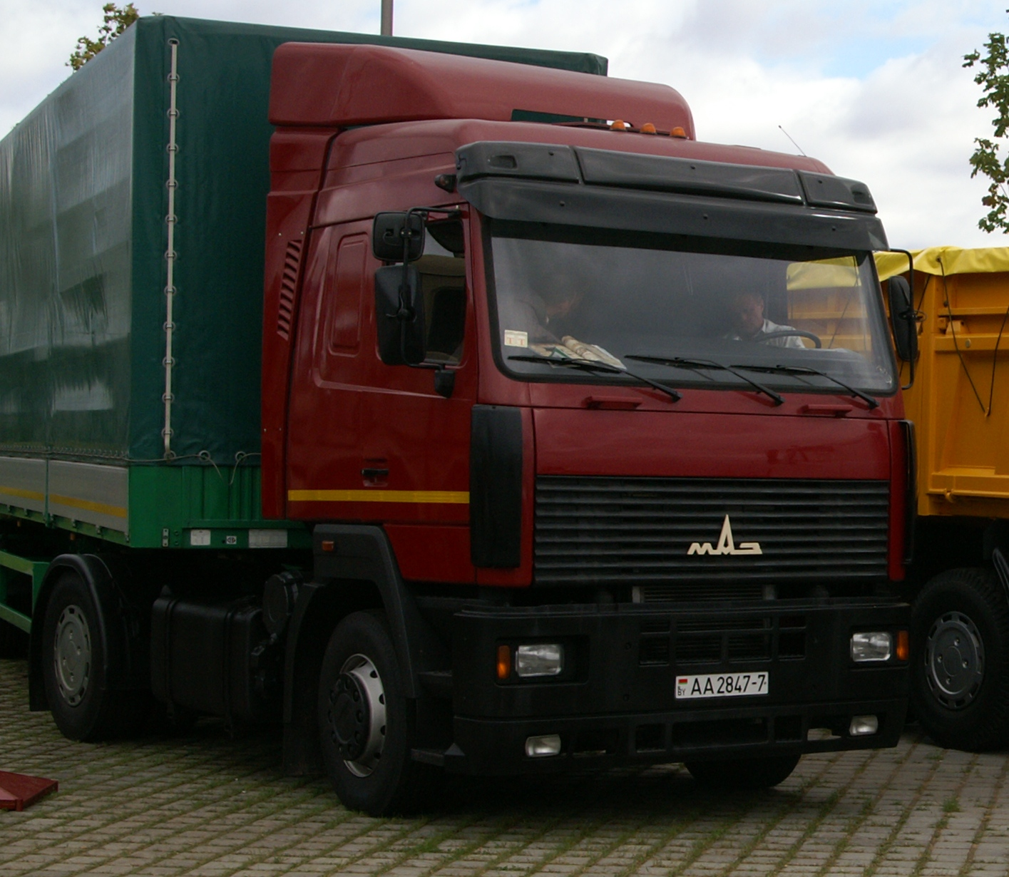 MAZ trucks in Minsk